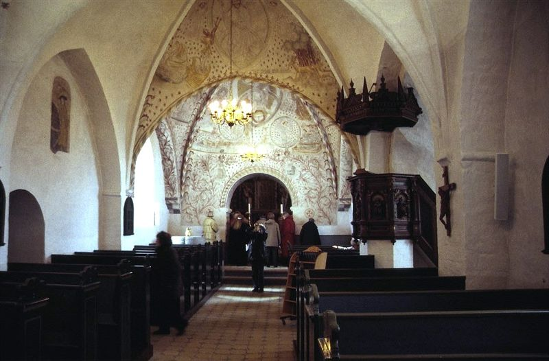 Tybjerg Kirke i Danmark. Skibet set mod øst